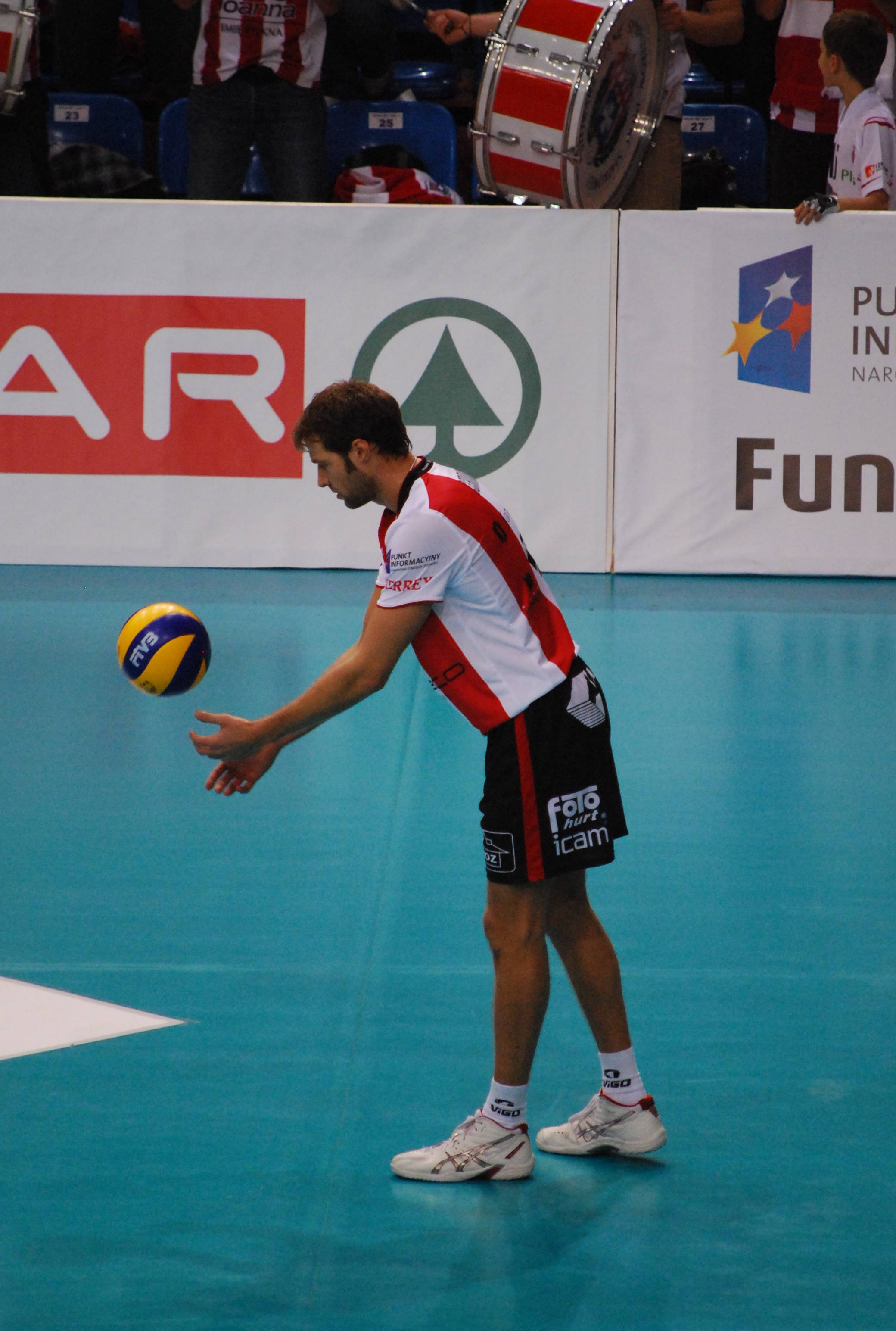 Matej Černič